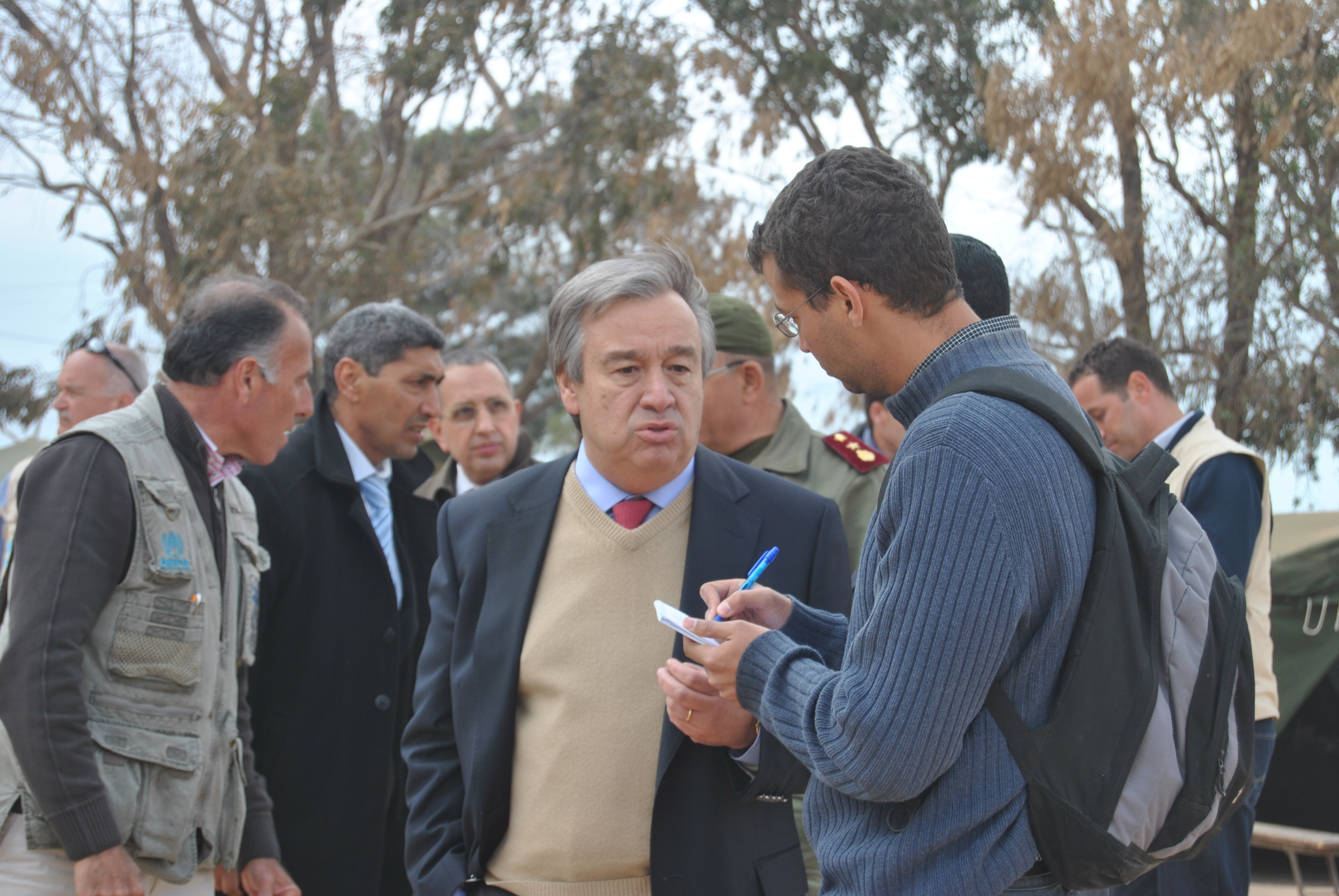 Le SG de l'ONU, António Guterres, dans la sud tunisien, au moment de la crise des réfugiés libyens à Choucha en mars-avril 2011. Il était le haut-Commissaire de l'ONU aux réfugiés (HCR).